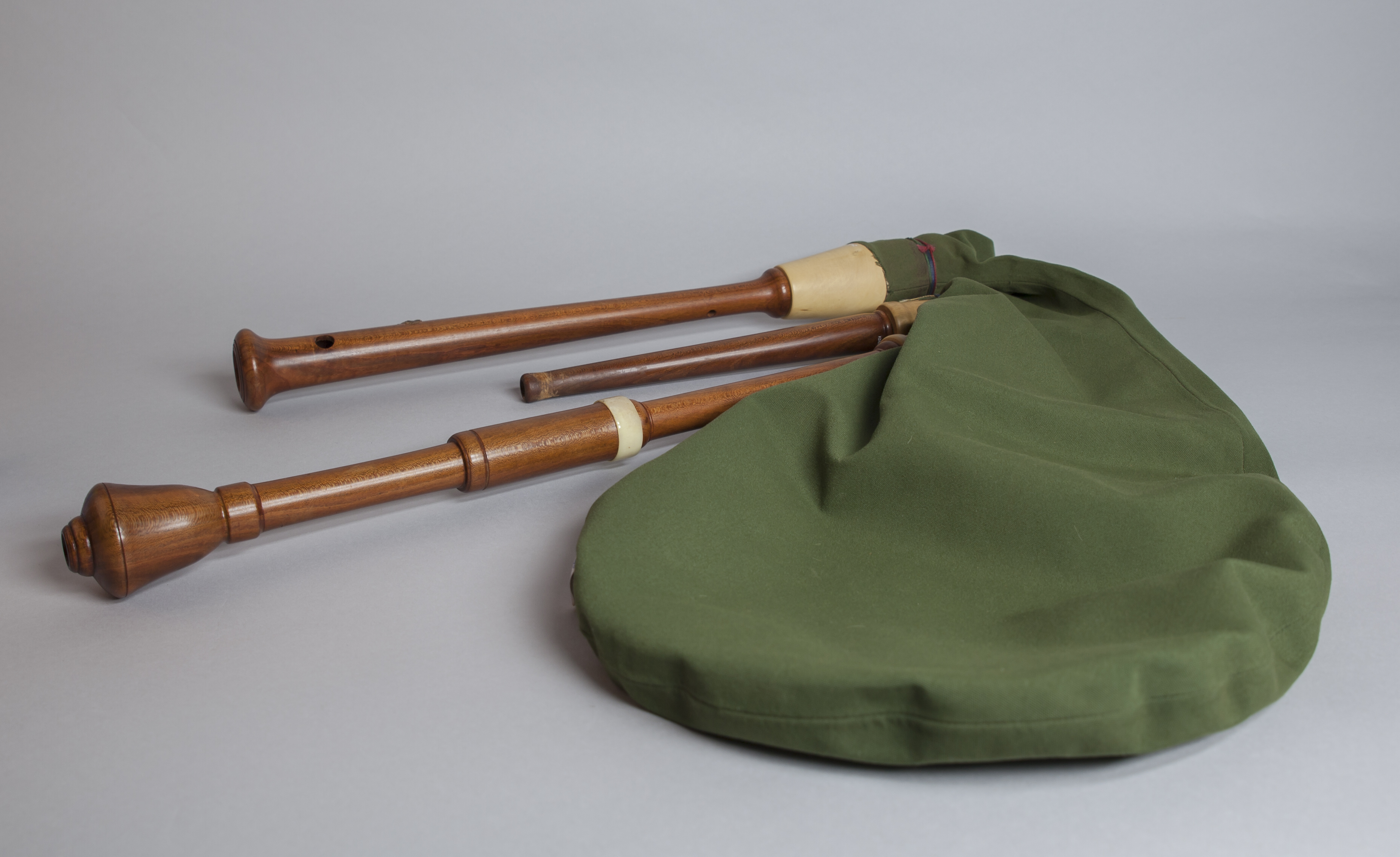 Sac de gemecs, MDMB 2421, construït l'any 2006 per Xavier Orriols